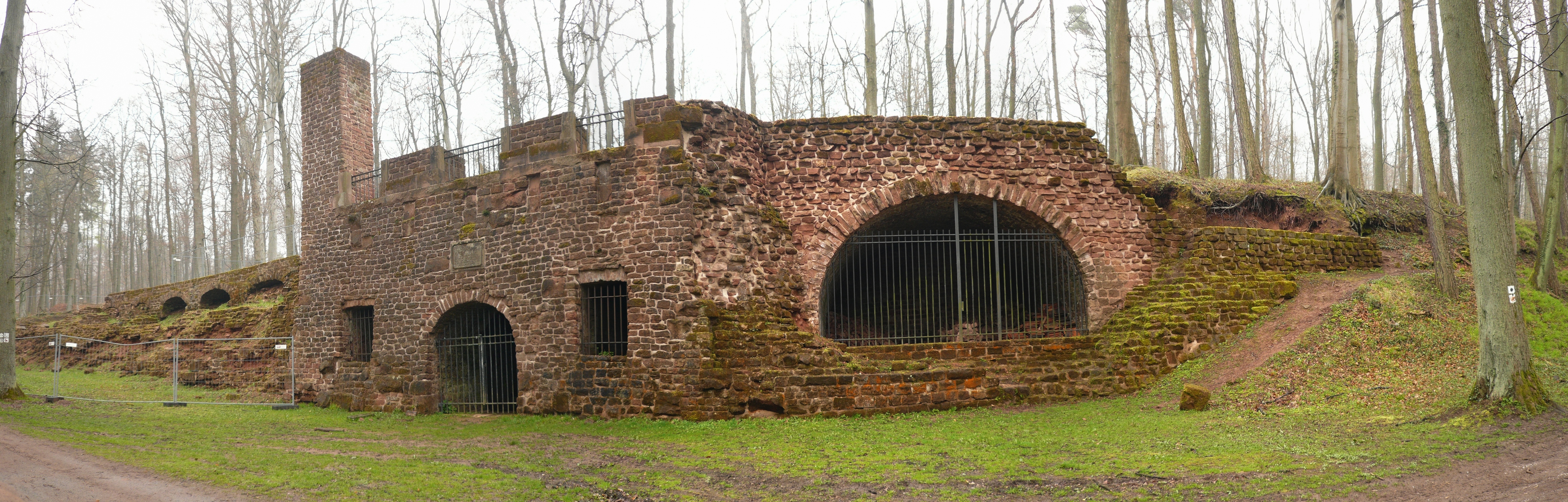 Orangerie near Homburg/Saar, destroyed in 1793